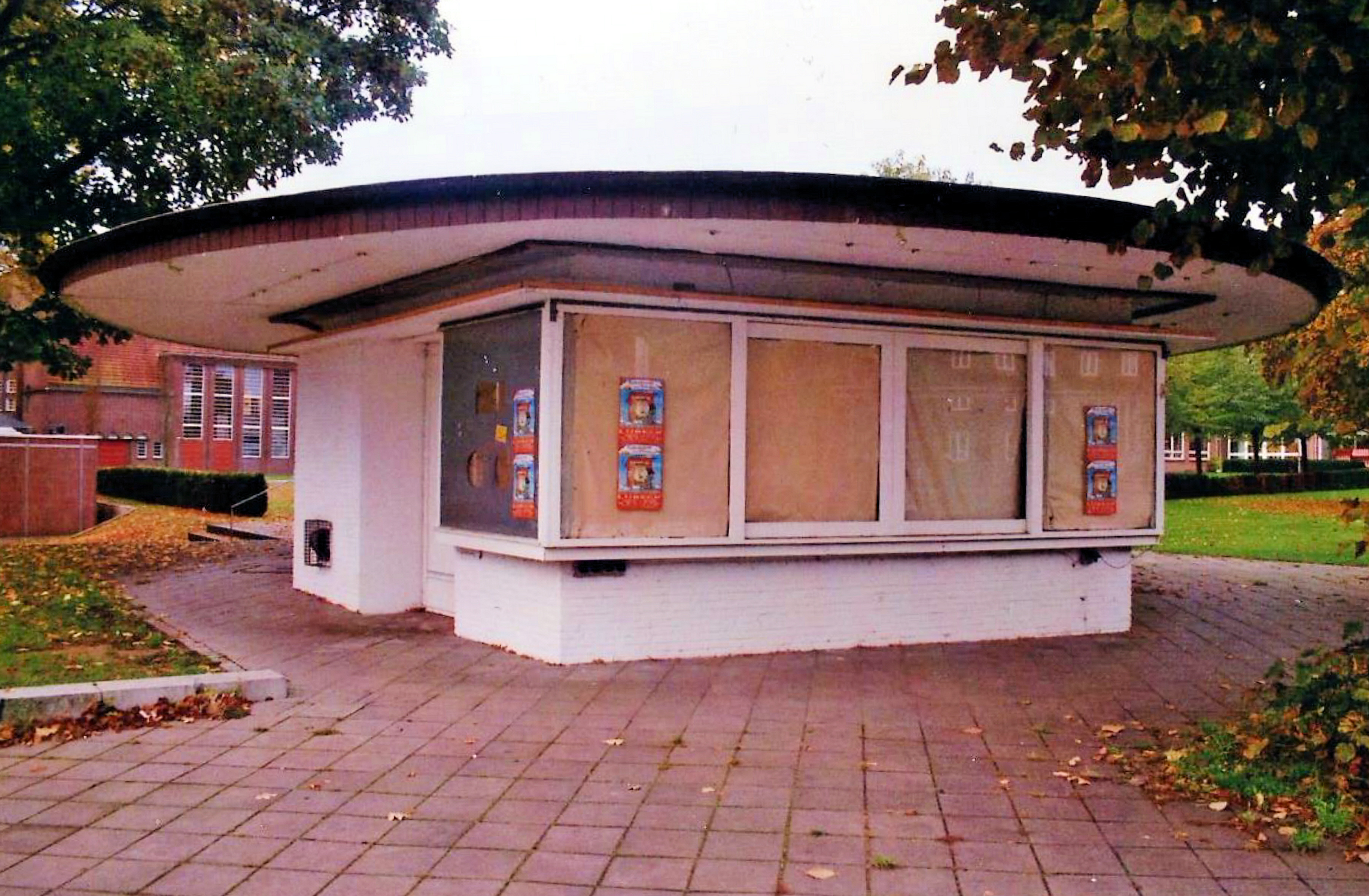 Unter Denkmalschutz gestelltes ehemaliges Kiosk am Holstentorplatz.